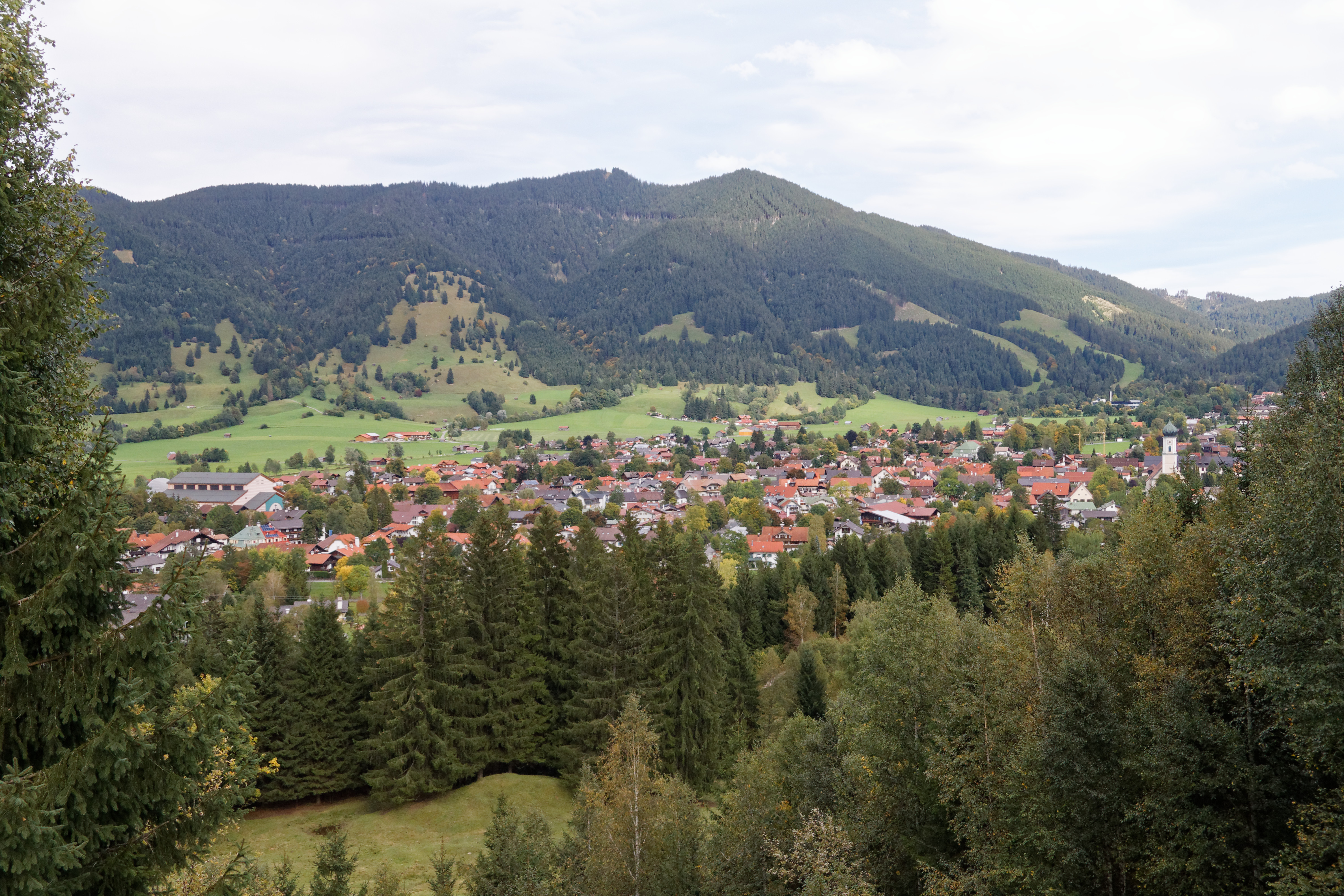 Blick vom Westen (Osterbichl) auf Oberammergau